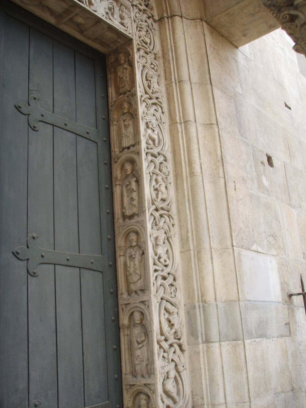 duomo di modena